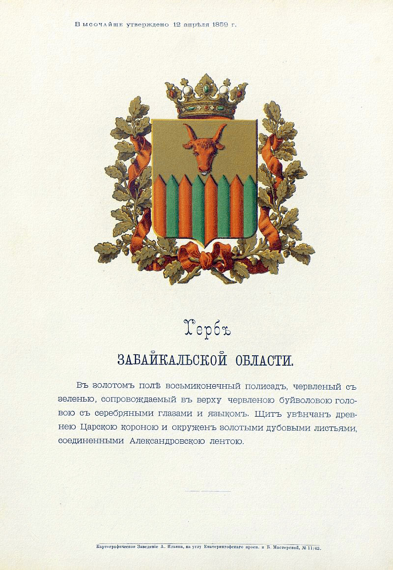 Official Russian Empire coat of arms Zabaikalie Oblast. Герб Российской Империи Забайкальской области с официальным описанием в Гербовнике МВД. Утверждён Императором Всероссийским Александром Вторым в 1859 году.